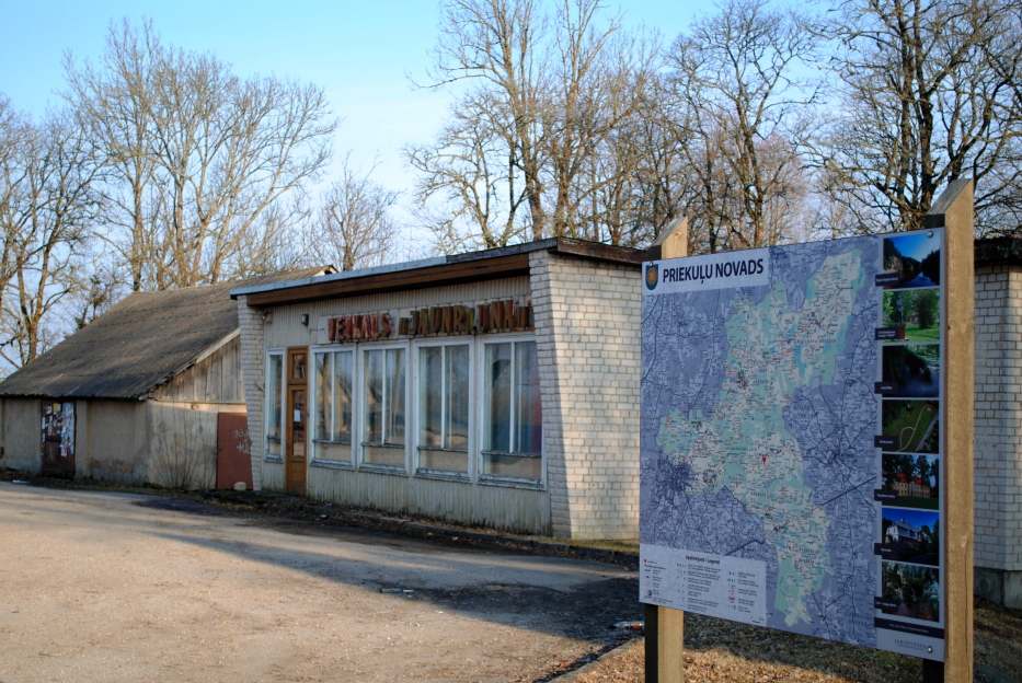 Jaunraunas centrs